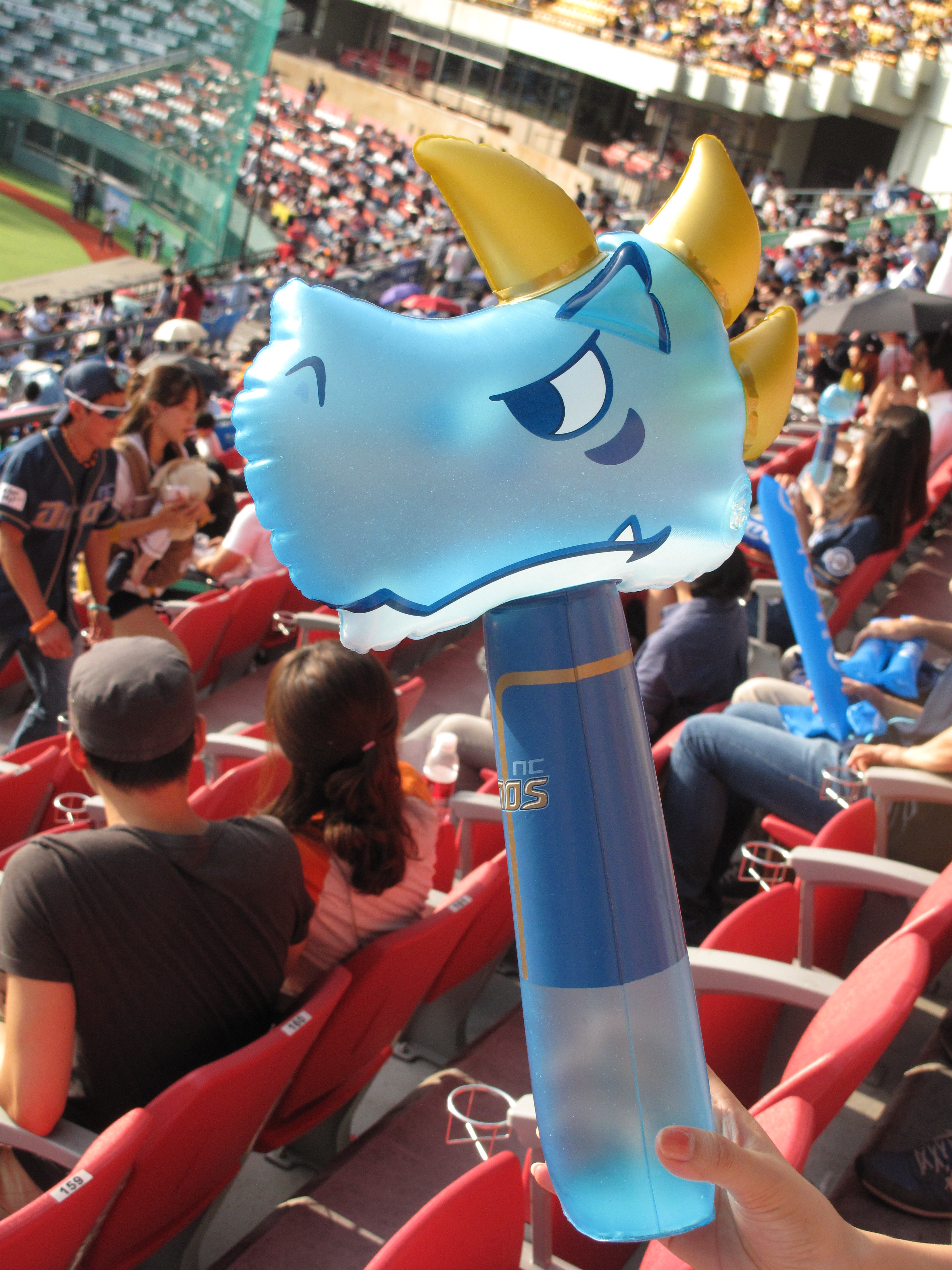 NC 다이노스의 응원도구 다이노스틱